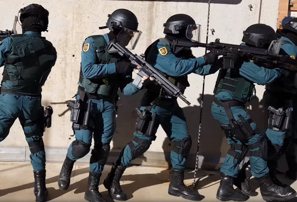 Mannequin Challenge UAR (Unidad de Acción Rápida)- Guardia Civil: Rapel. Los antecedentes de la Unidad hay que situarlos en abril de 1978 con la creación de la Unidad Antiterrorista Rural (UAR) instruida en la Escuela Militar de Montaña y Operaciones Especiales de Jaca –con alrededor de 40 componentes-. En base a esta Unidad se crearía el Grupo Antiterrorista Rural (GAR) con una entidad superior a los 500 especialistas, pasándose a denominar, tras diversas denominaciones, a la actual de Grupo de Acción Rápida (GAR).